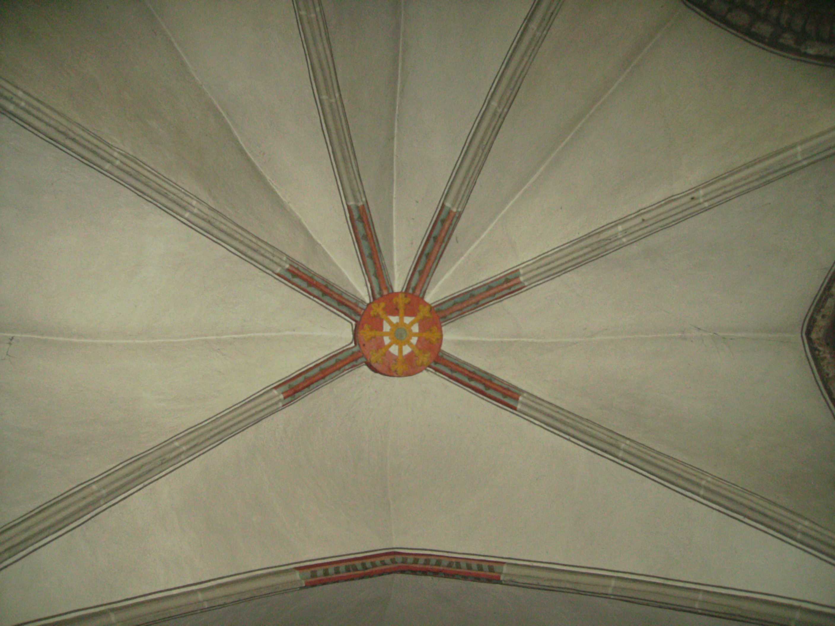 Kreuzrippengewölbe mit Schlussstein im Chor der Alten Kirche Kellen